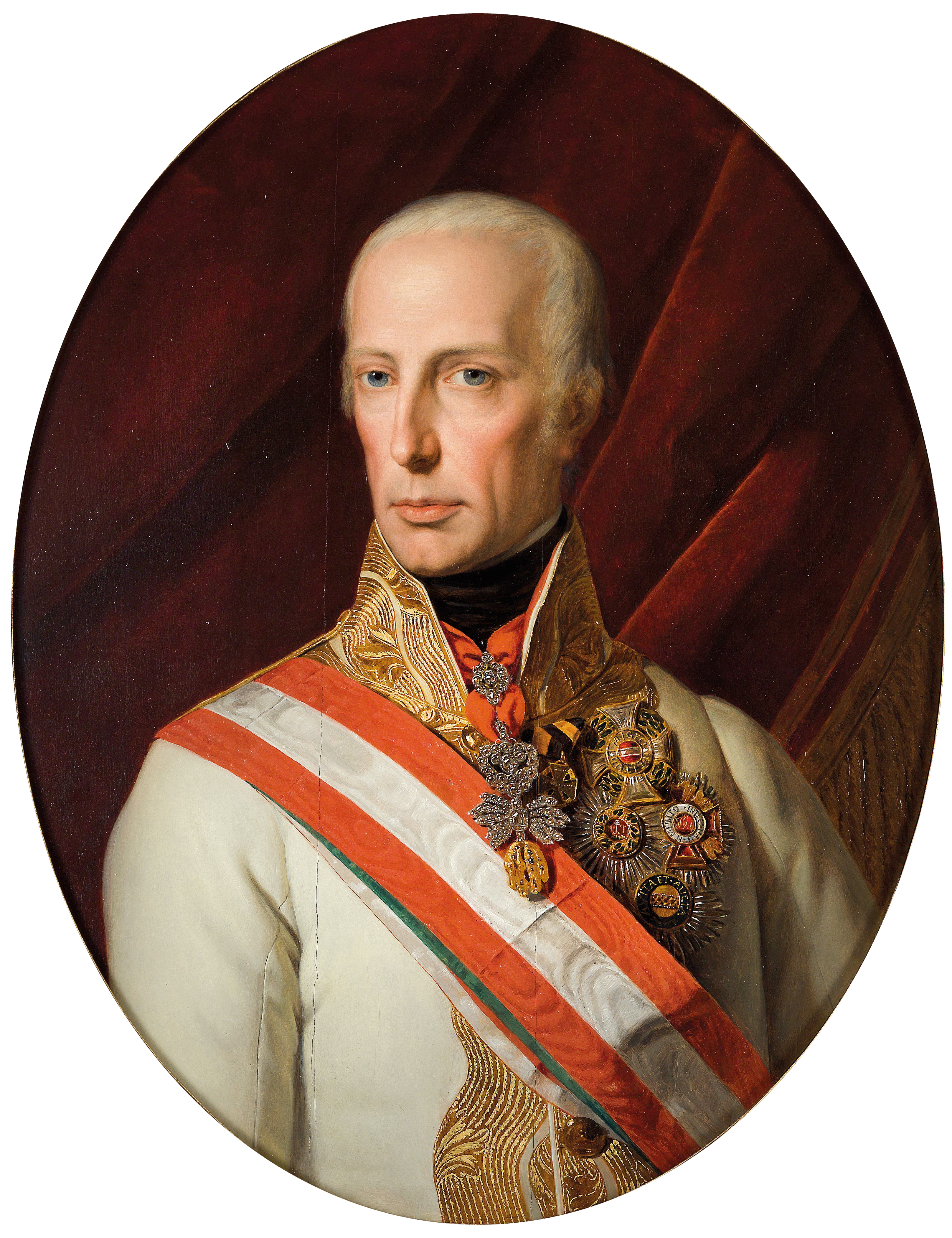 Kaiser Franz I. von Österreich, Porträt des Kaisers in Uniform mit Ordensschmuck; Werksverzeichnis Feuchtmüller Wien 1996.